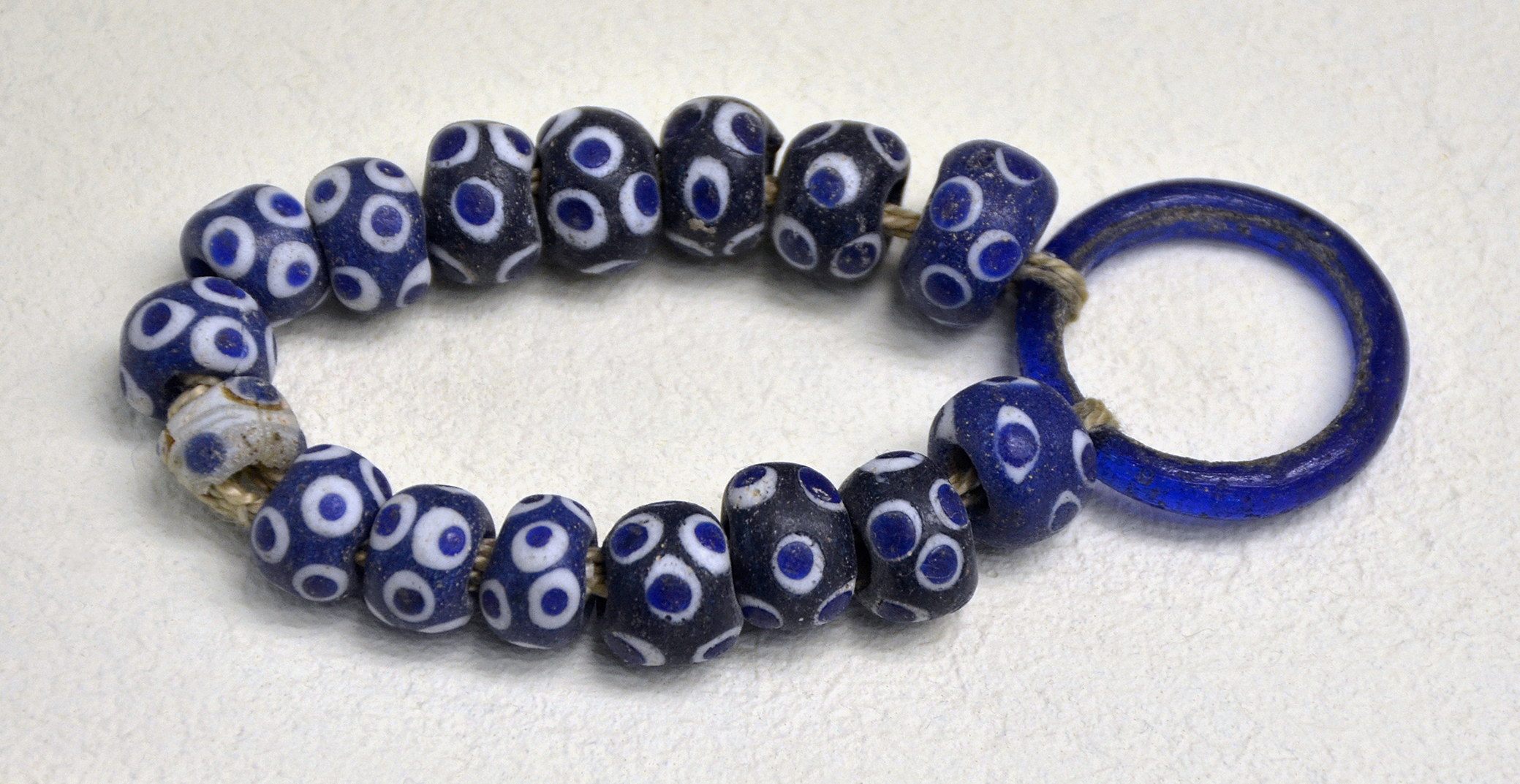 Bracelet avec 16 perles ocellées en pâte de verre et un anneau en verre. Provient de la nécropole des "Vins de Bruyère" près de Prosnes ( Marne ) ; période de la Tène ancienne, 5ème siècle - JC. Tombe M 33 / B 123, fouilles de Maurice Bry et de Marie-Louise Morgen, entre 1928 et 1937. Actuellement exposé au Musée Saint-Remi à Reims.